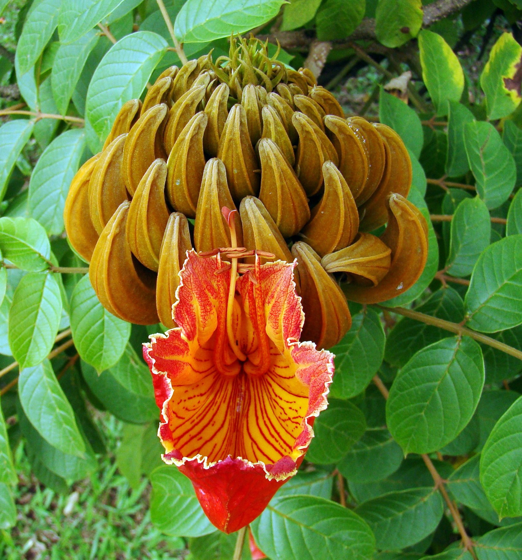 Cerert Park Sao Paulo